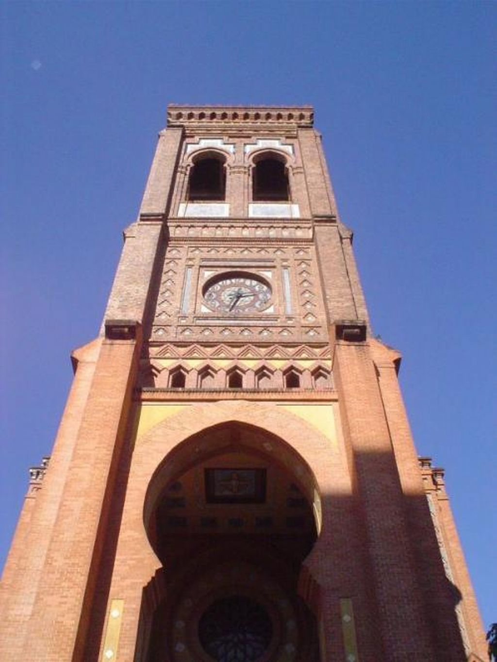 (portuguese) Igreja (basílica) do Imaculado Coração de Maria, no bairro do Méier, Rio de Janeiro, Brasil